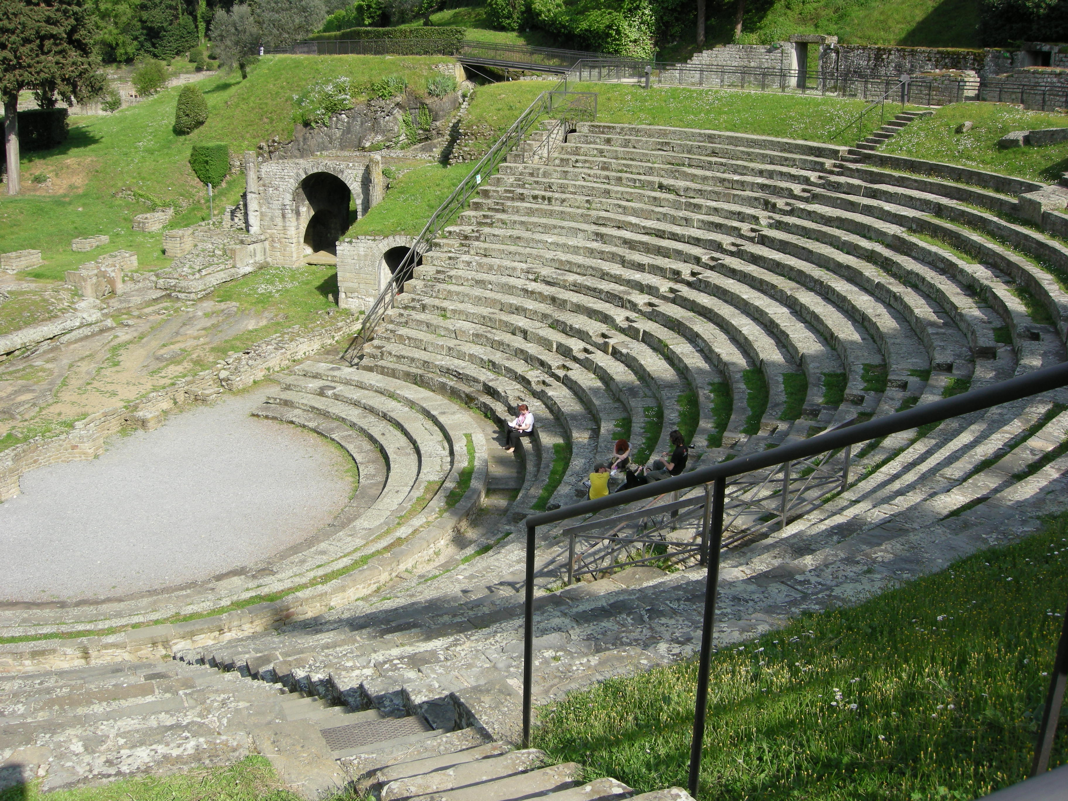 Fiesole, area archeologica, teatro